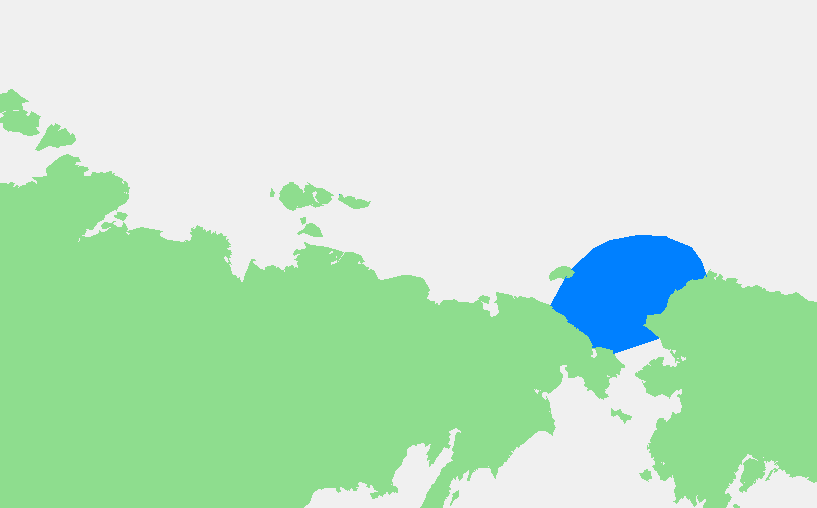 Tsjoektsjenzee.PNG